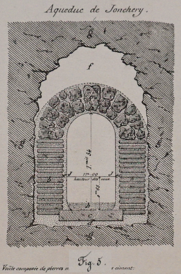 issu du Mémoire Topographique par A Savy 02760 imprimé par Barbat à Châlons